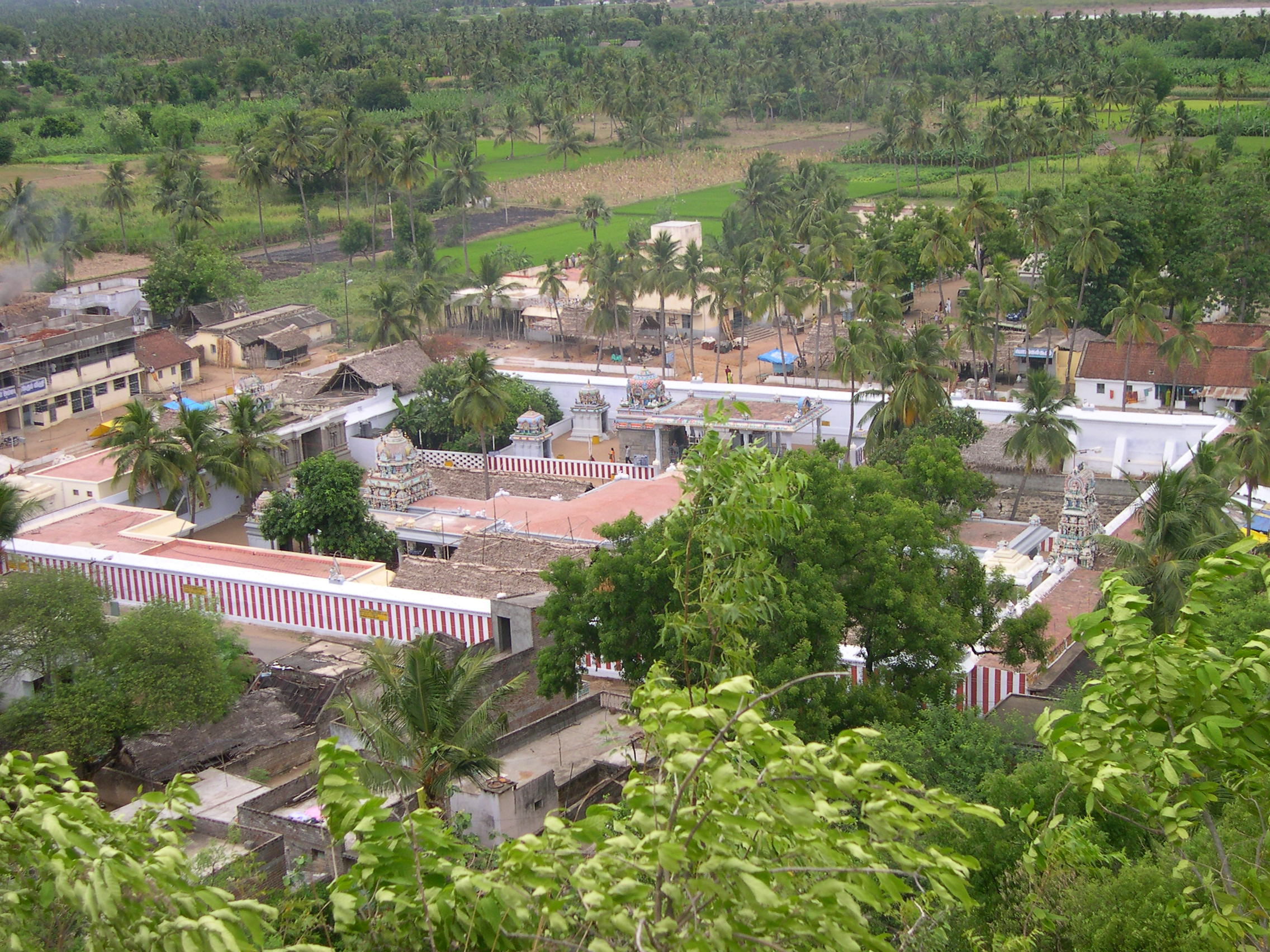 Padavedu, Thiruvannamalai District